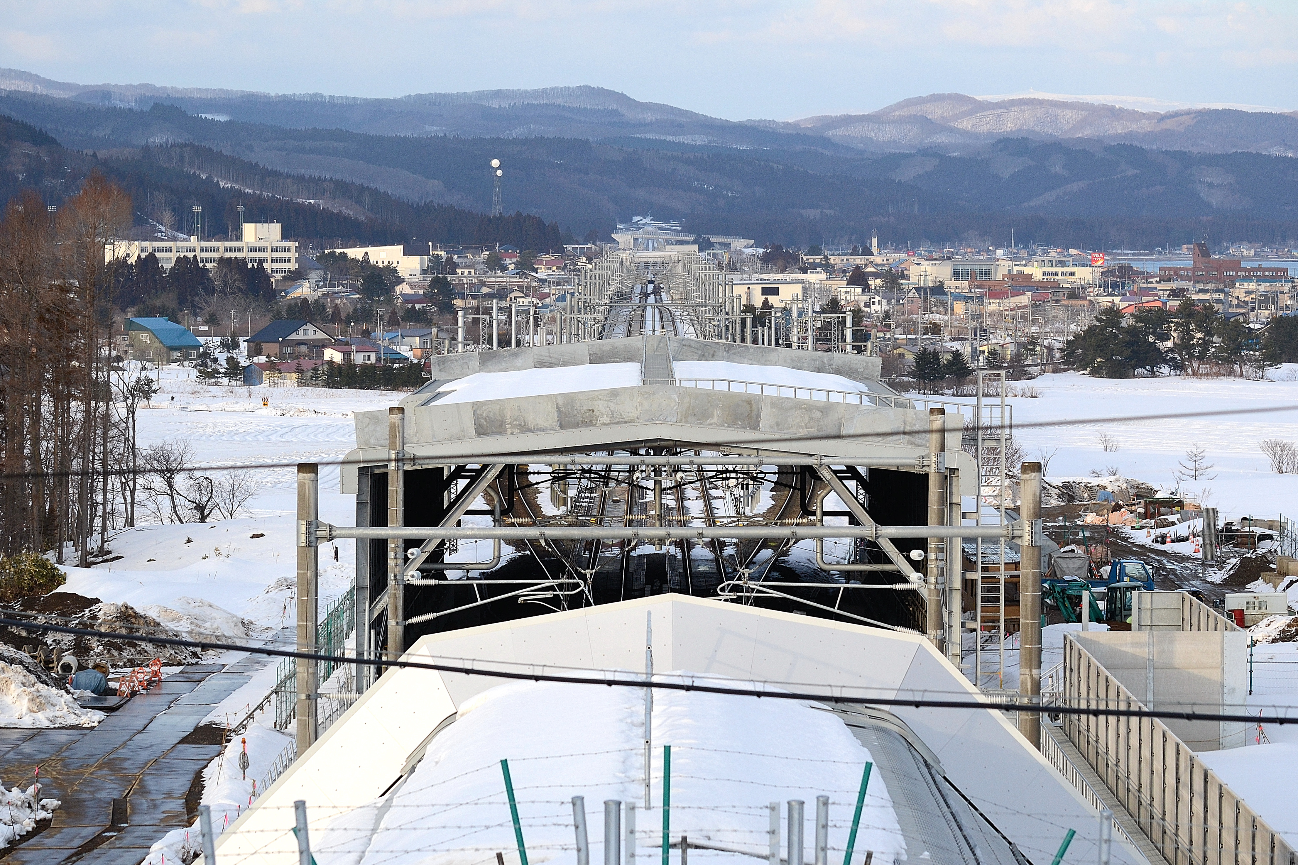 木古内町にある｢北海道新幹線ビュースポット｣から海峡線の木古内駅方面を見る。手前にあるのは北海道新幹線と在来線との分岐点であり シェルターで覆われている。